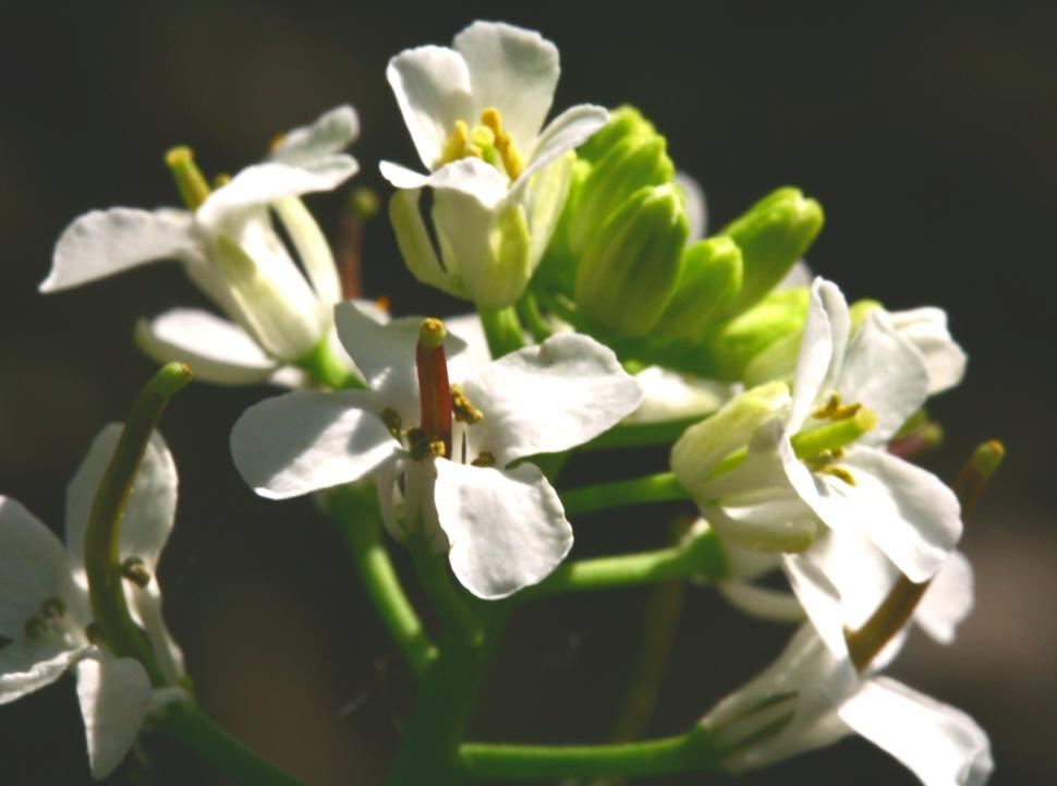 Alliaria petiolata